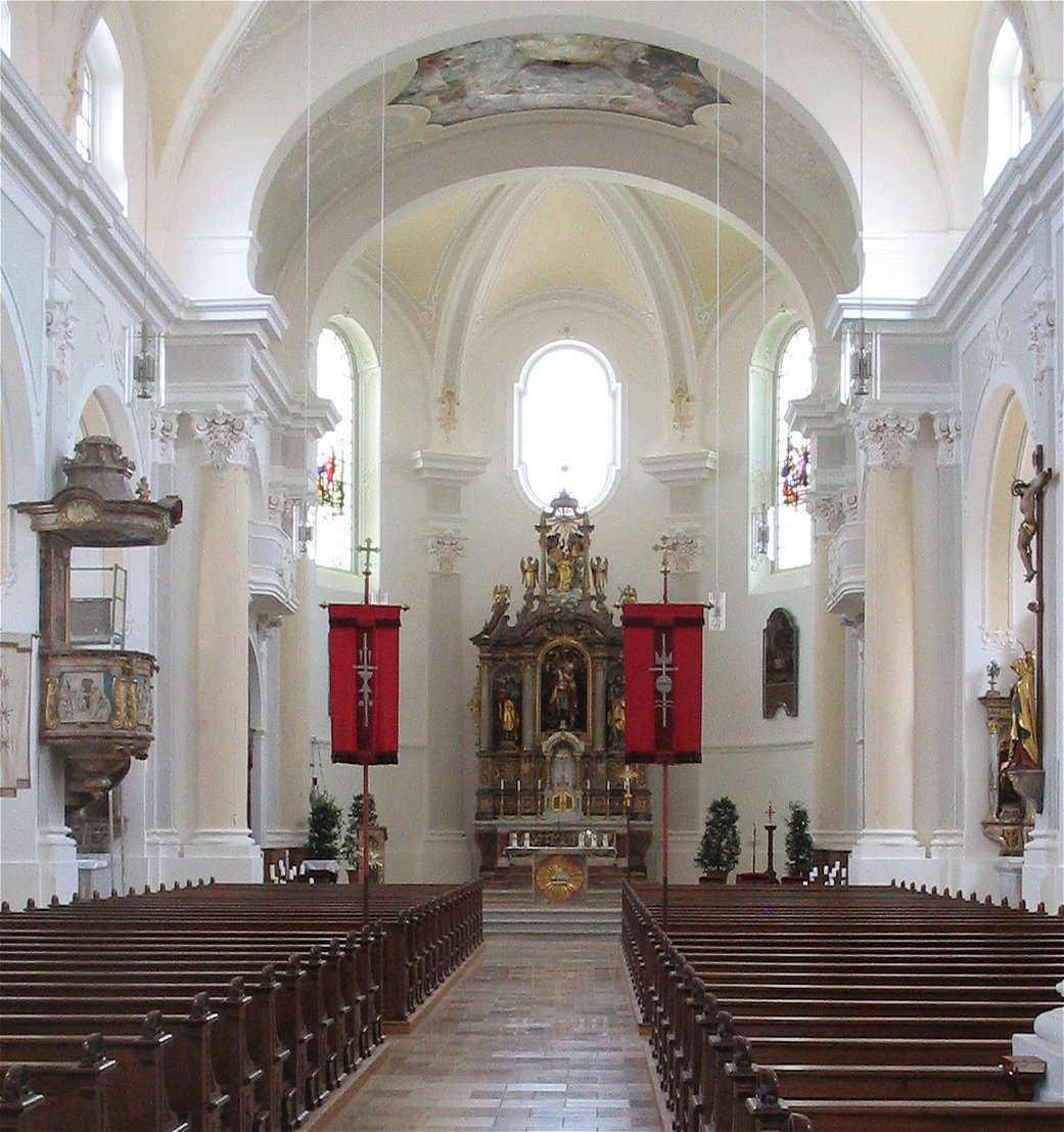 Innenaufnahme der ehemaligen Klosterkirche Kloster Hohenwart, jetzt Pfarrkirche Hohenwart